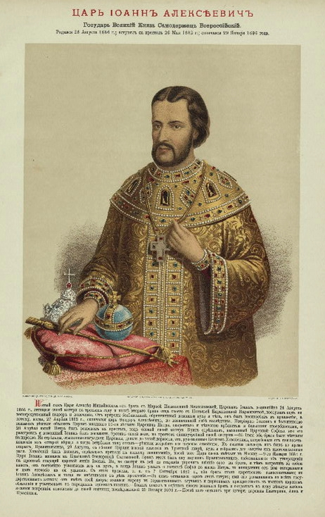 Ivan V of Russia